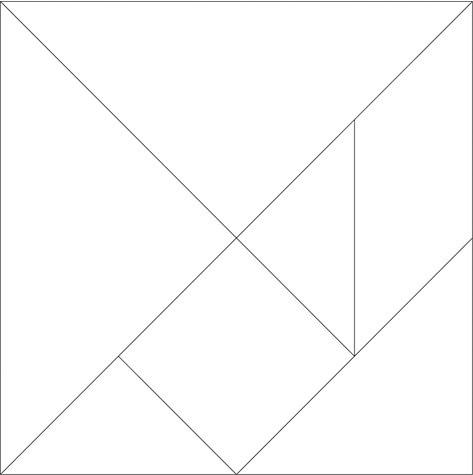 Tangram imprimible. Version standart de 20x20cm